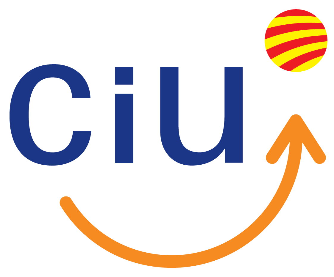 Logotip actual de CiU